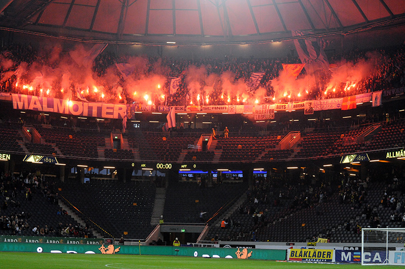 Malmö FF fans guldmatchen 2014 borta mot AIK 2014-10-05